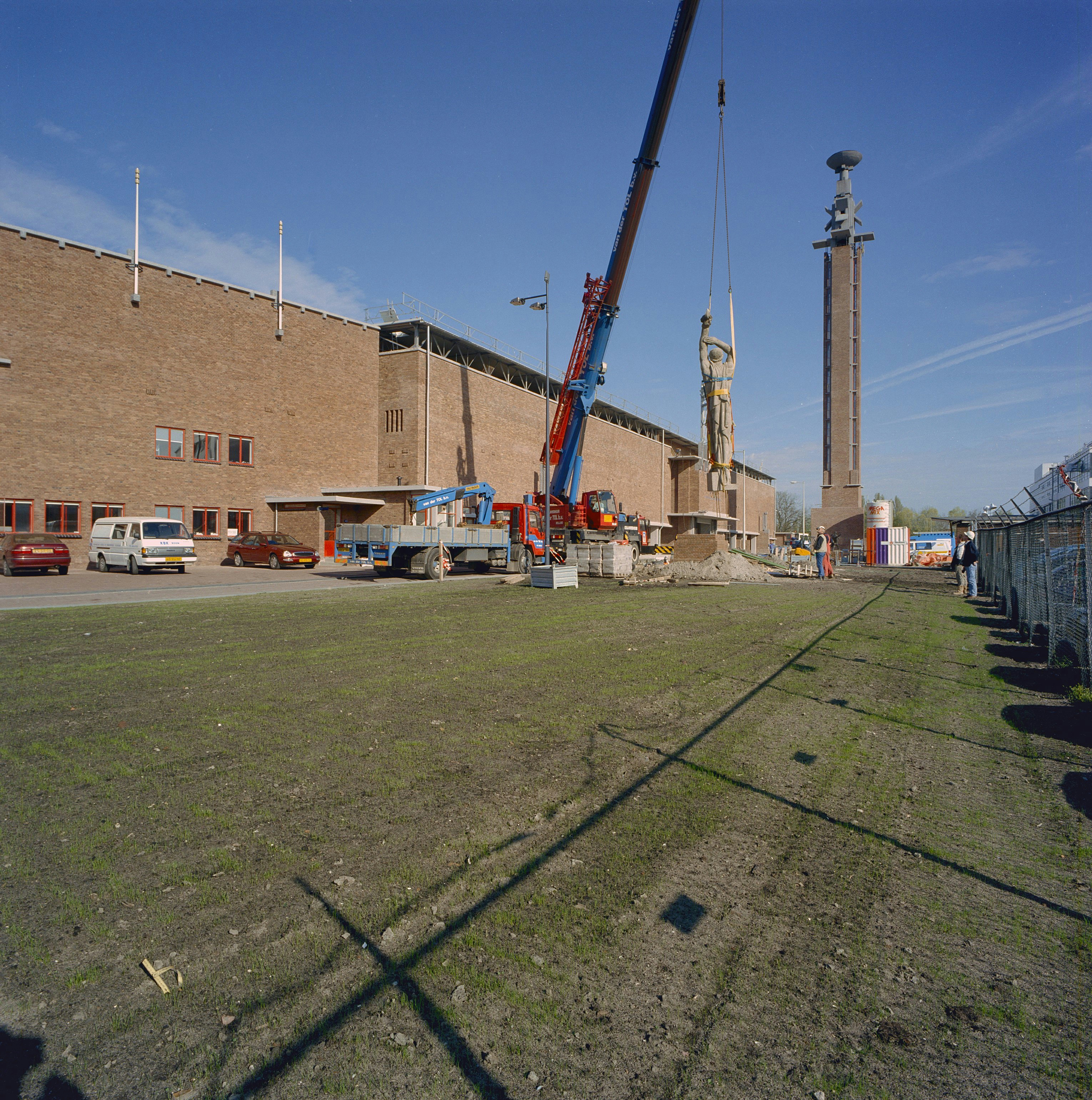 Olympisch Stadion: Gedeelte gevel, toren, beeld, na de restauratie